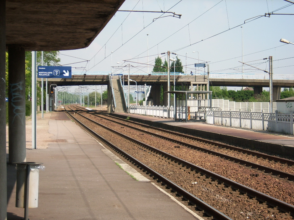 Photo de la gare de Graville